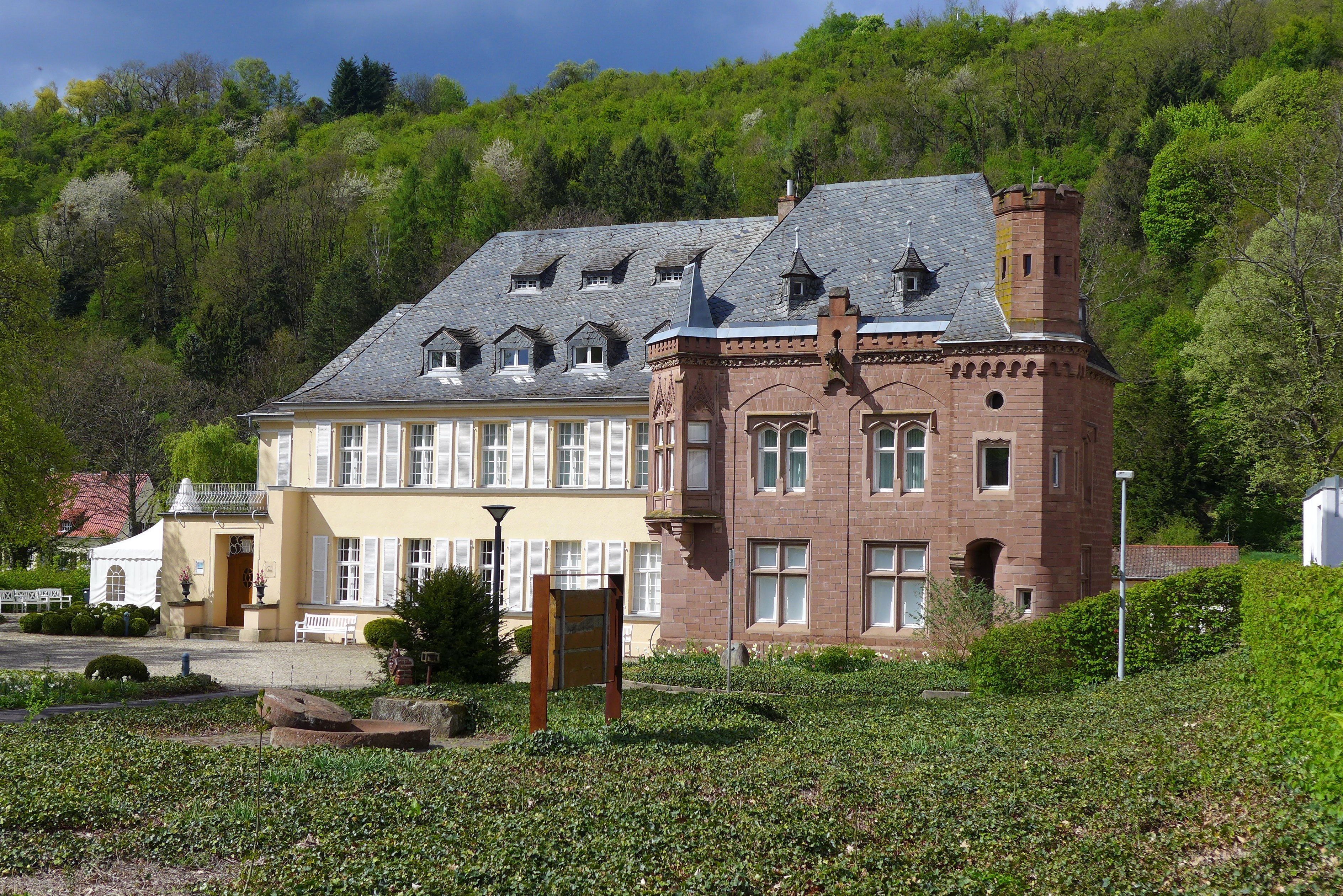 Merzig, Schloss Fellenberg